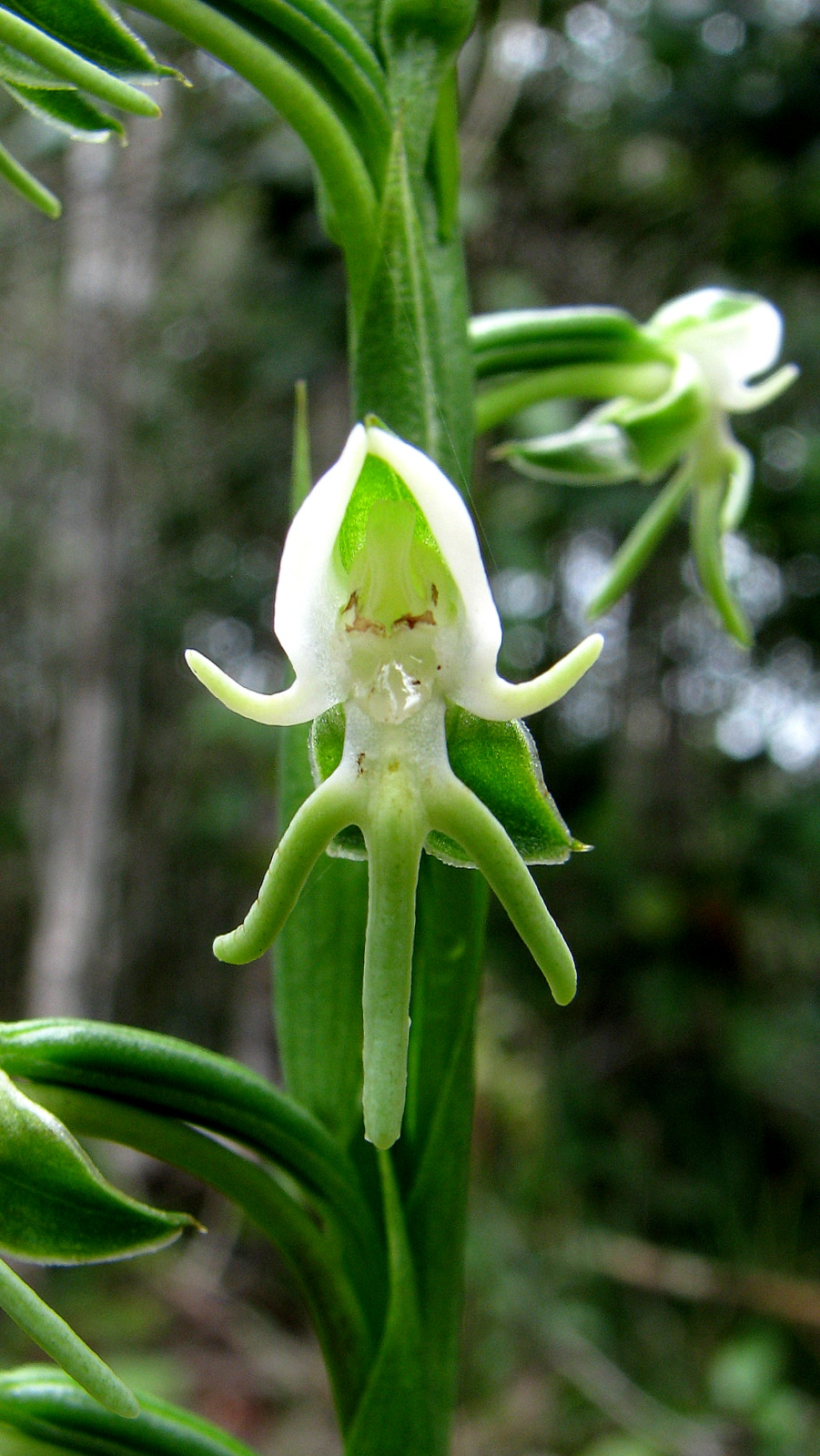 Habenaria longipedicellata Hoehne